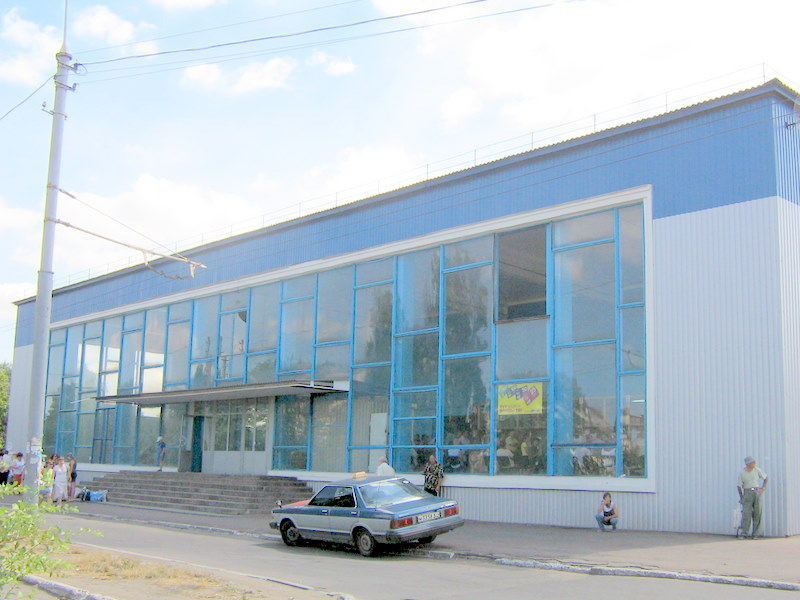 Міжміський автовокзал міста Маріуполь, Успенська площа, вул. Артема, Жовтневий район.